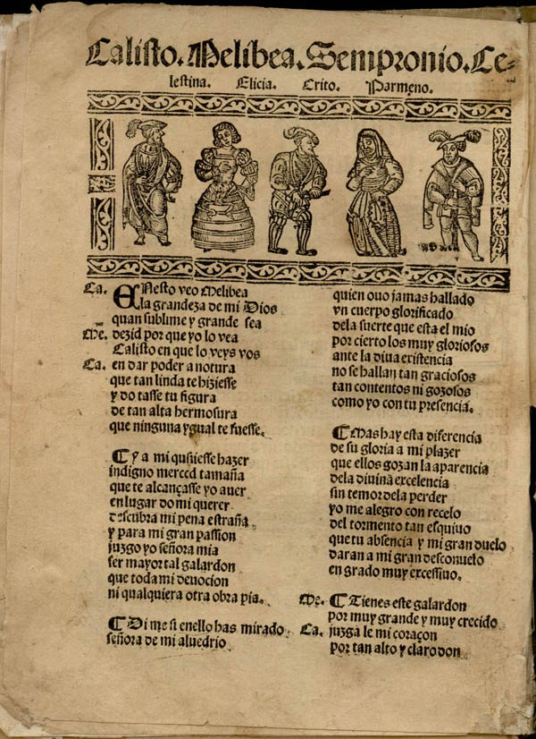 Comienzo de la "Tragicomedia de Calisto y Melibea" versificada por Juan Sedeño.